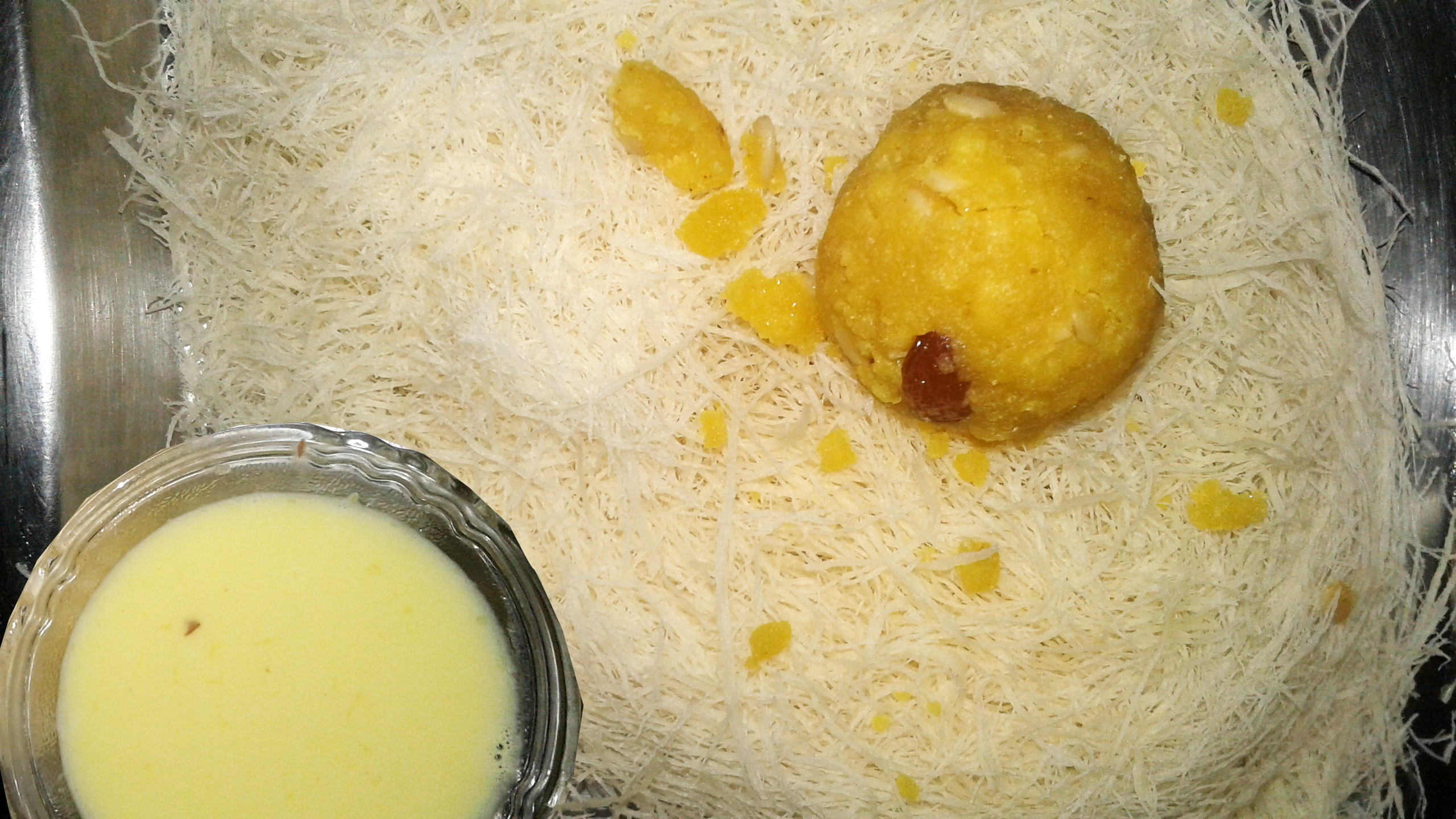 ಕನ್ನಡ: ಫೇಣಿ ಲಾಡು ಮತ್ತು ಬಾದಾಮಿ ಹಾಲು